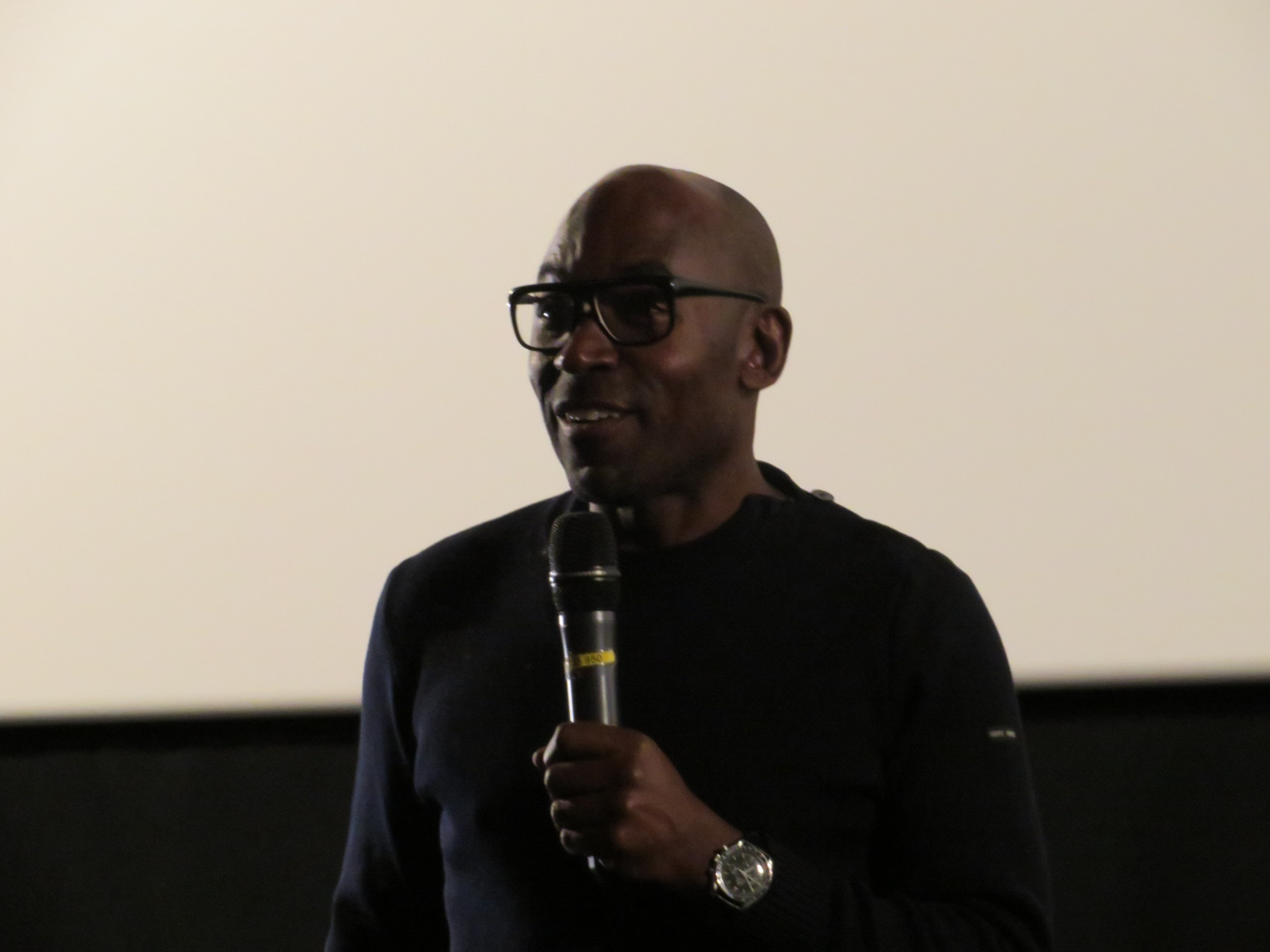 Lucien Jean-Baptiste, lors de l'avant-première de son film "La Deuxième Etoile", à Beauvais (Oise), le mercredi 8 novembre 2017.